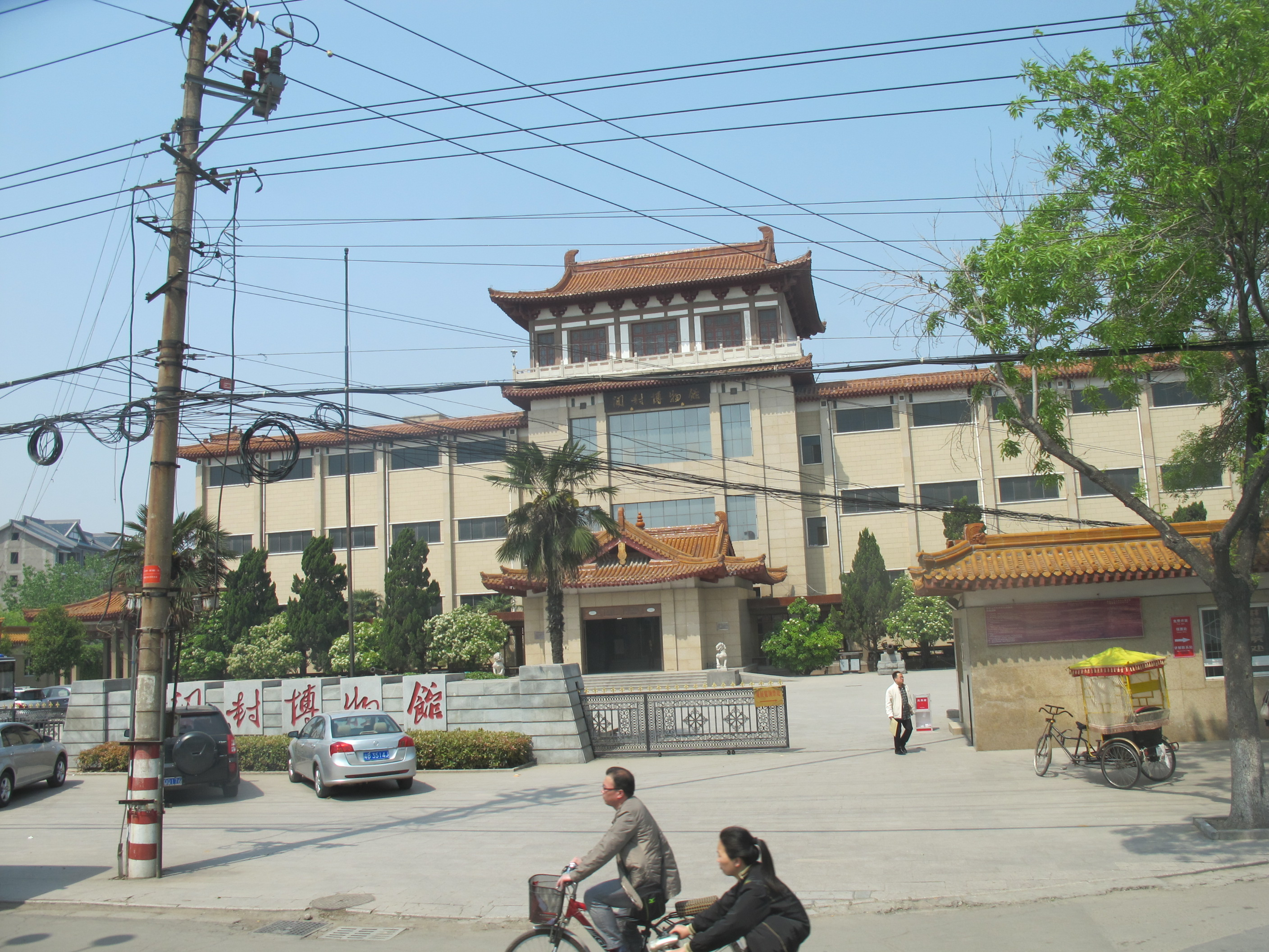 开封博物馆